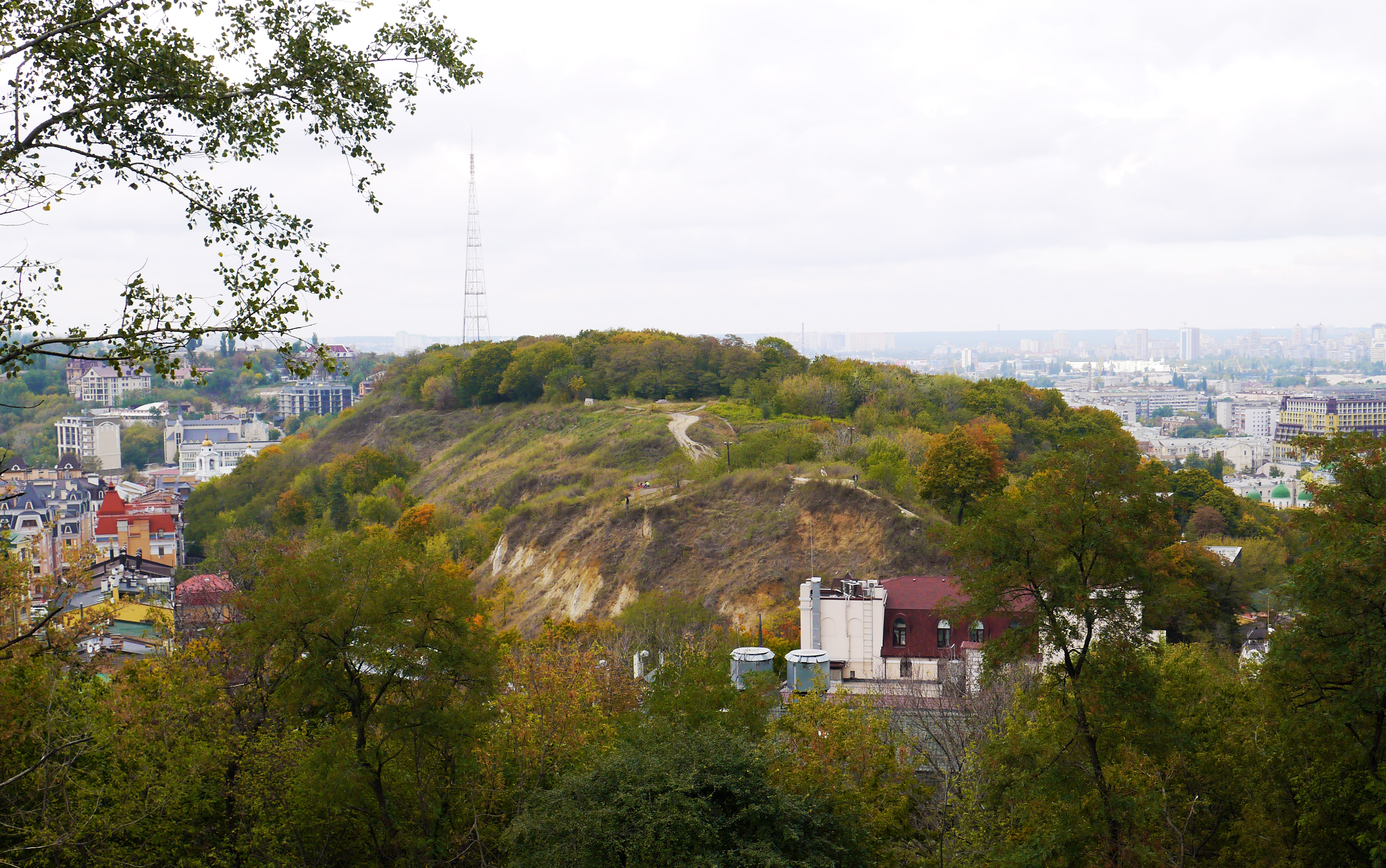 Поселення багатошарове та городище, Київ, :uk:Андріївський узвіз, ур. Замкова гора